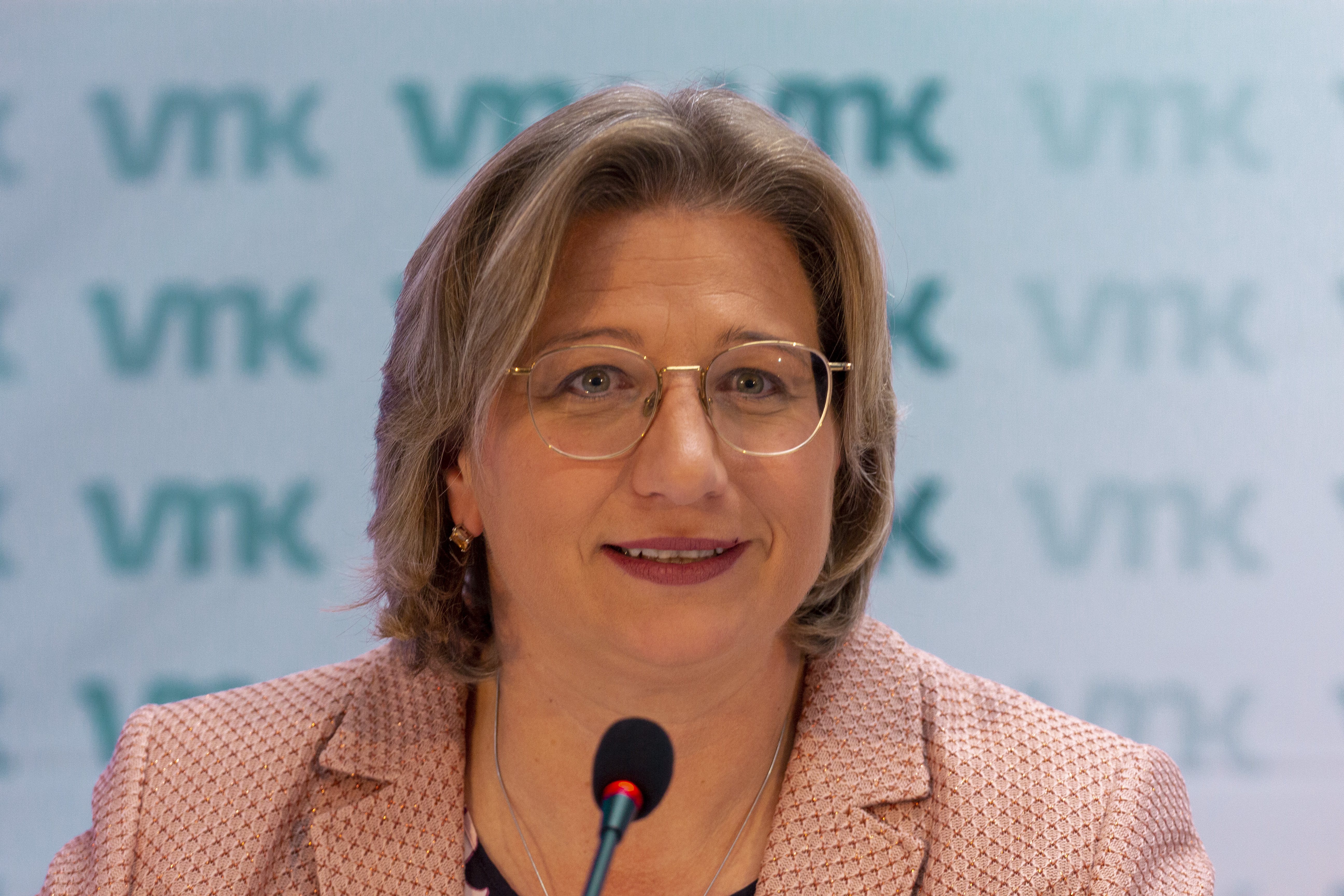 Anke Rehlinger am 10. Oktober 2019 in Frankfurt am Main im Rahmen der Verkehrsministerkonferenz.